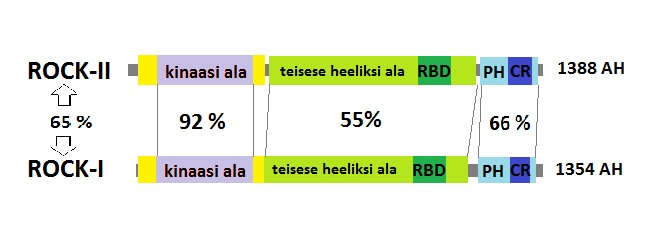 PH - plekstriini homoloogia ala, CR - tsüsteiinirikas ala